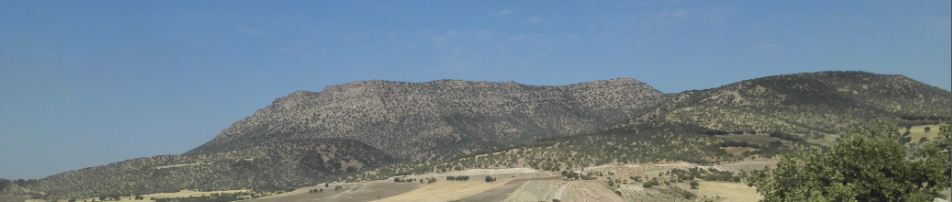 نمای کوه بزه هو